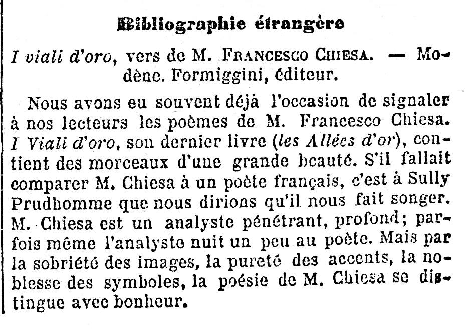 Critique d'un recueil poétique édité par la maison d'éditions Formiggini.